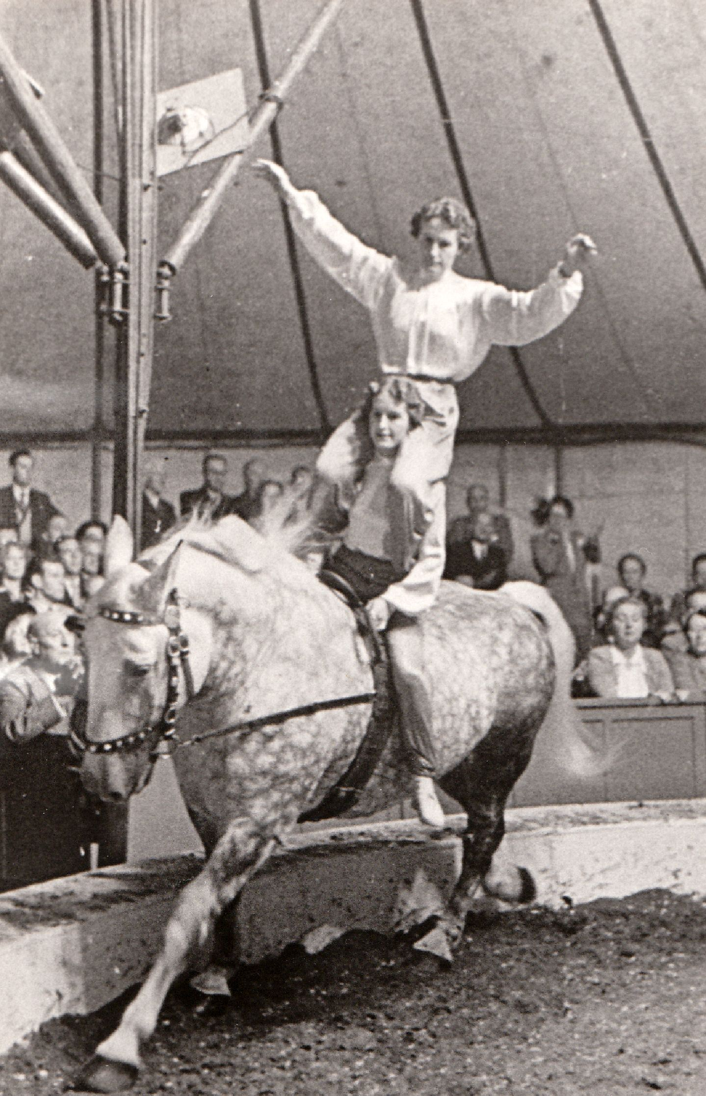 Circus Het Hoefke. Voltigenummer, paardacrobatiek door Harrie Kivits en Anny en Tiny van Doorne op paard Monty. Coll Hans van Hoek.